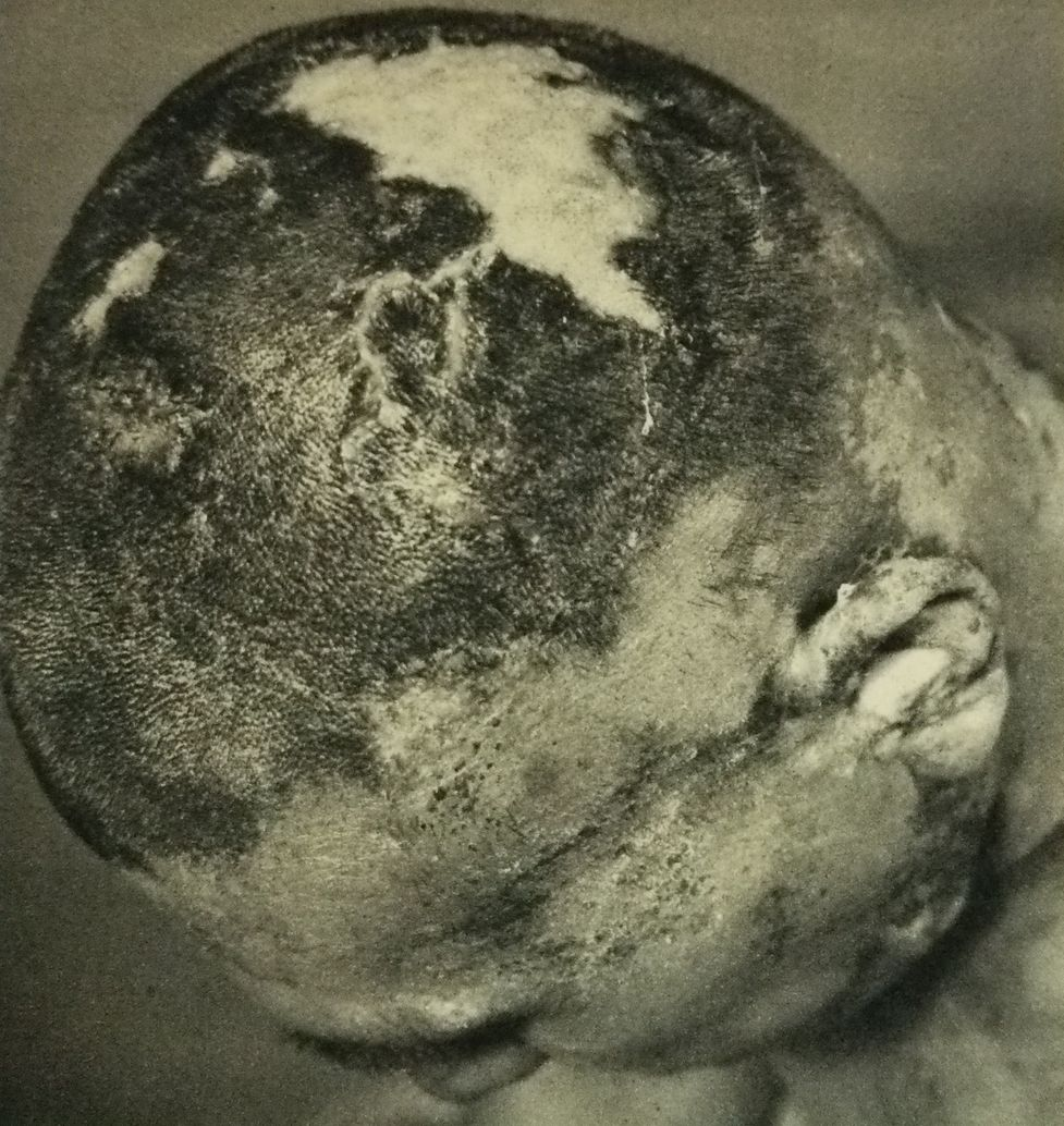 第五福竜丸乗組員の頭部。上皮組織が剥離している。